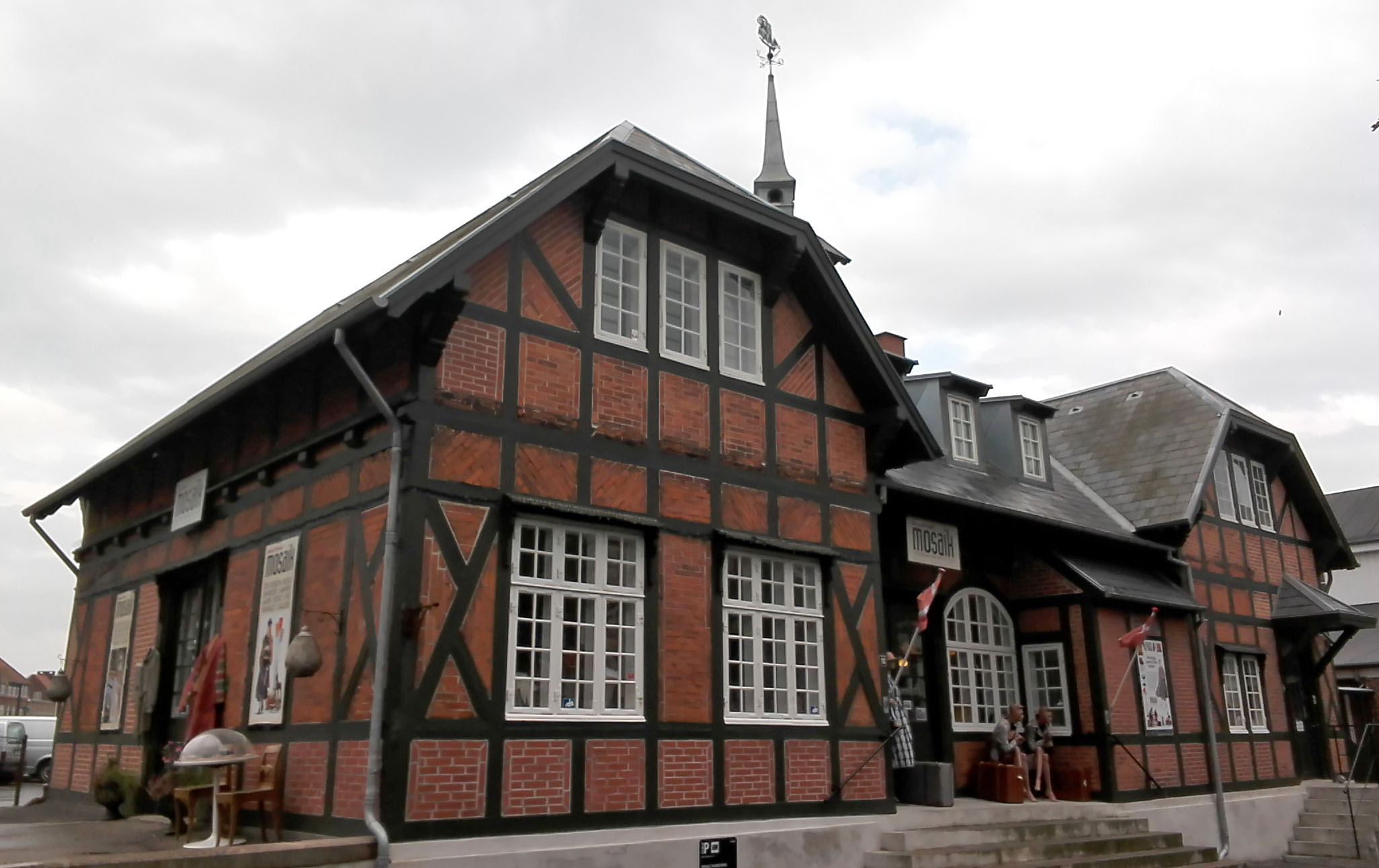 Svendborg N Station fra syd